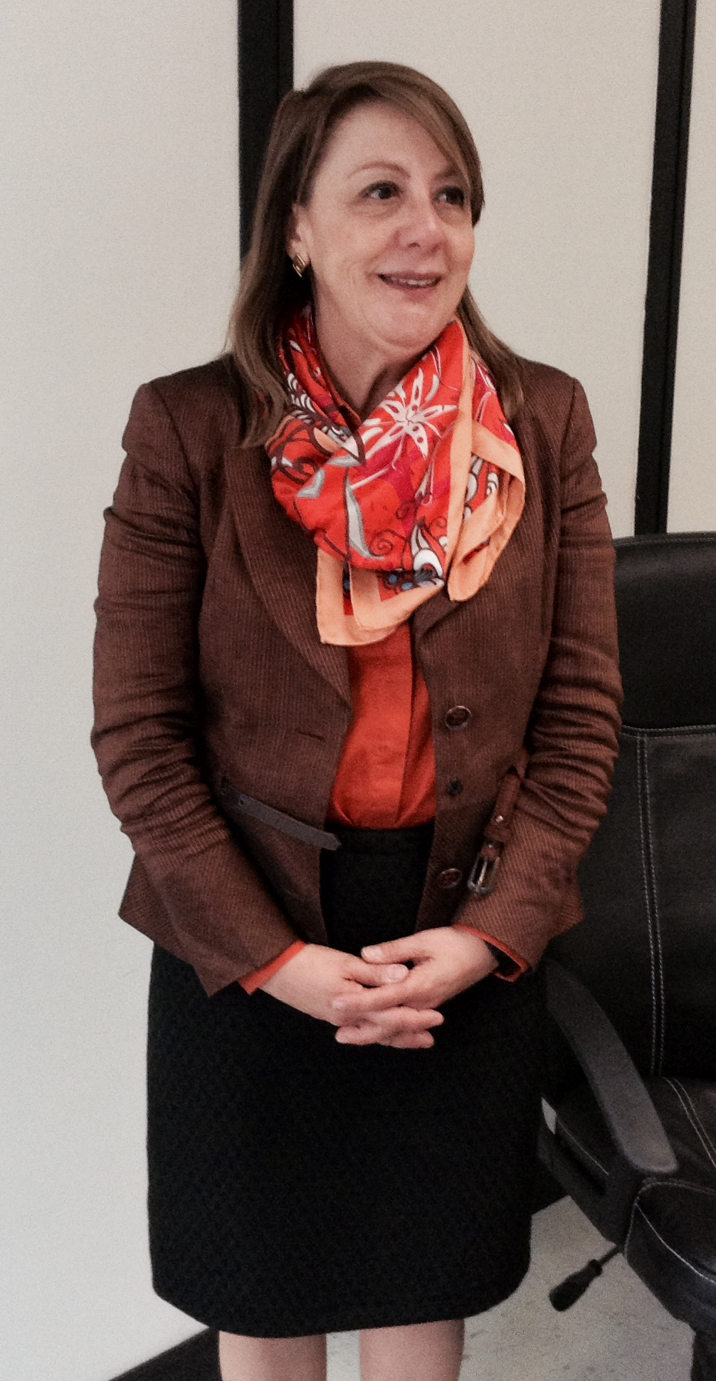 Jefa del Programa de Inmunología Molecular Microbiana, PIMM